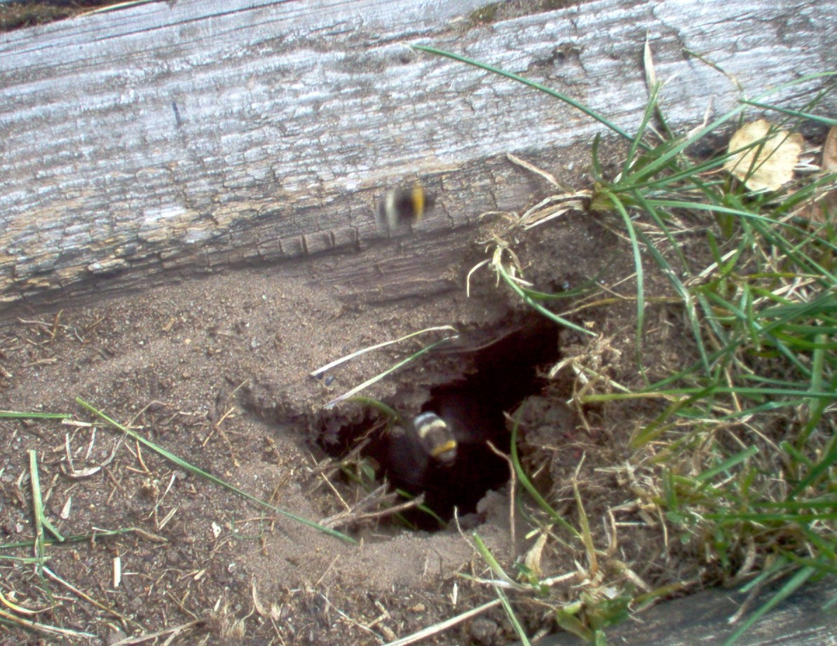 Kaksi kimalaista lentämässä maanalaiseen pesäänsä.